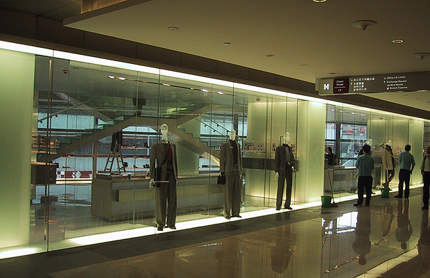 Negozio di Armani ad Hong Kong